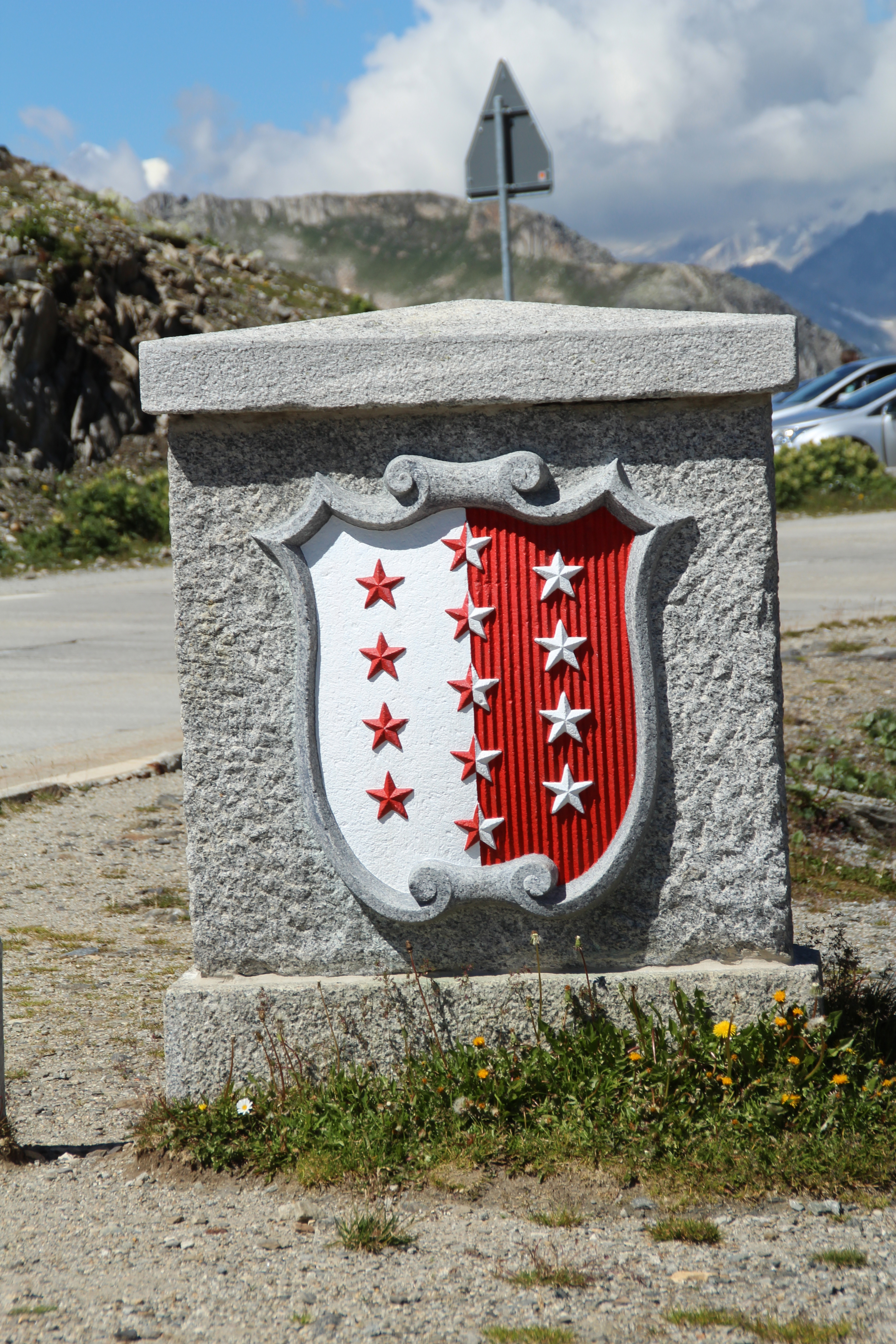 Nufenenpass